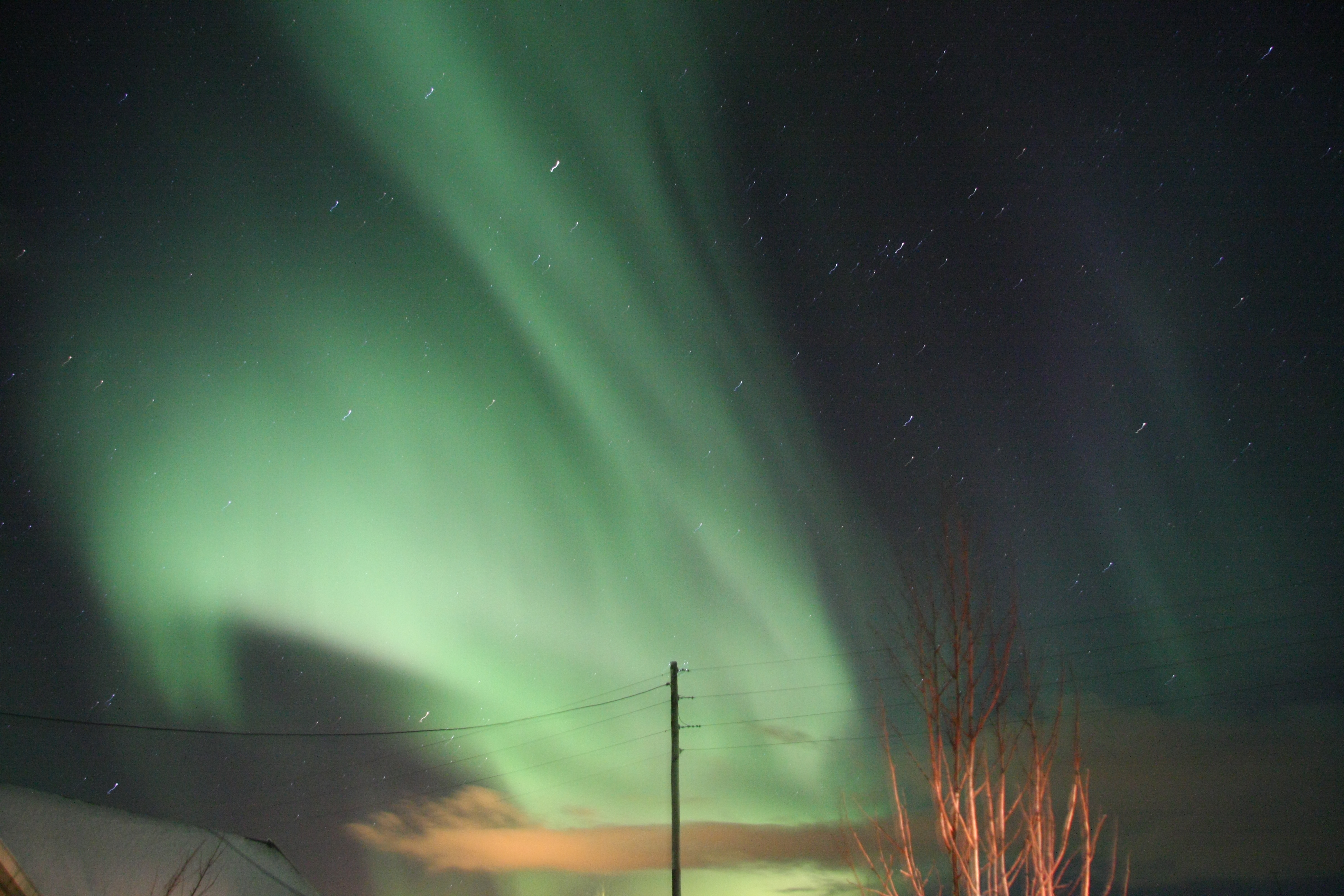 Aurora Borealis in der Nähe von Vadsø, Nord-Norwegen